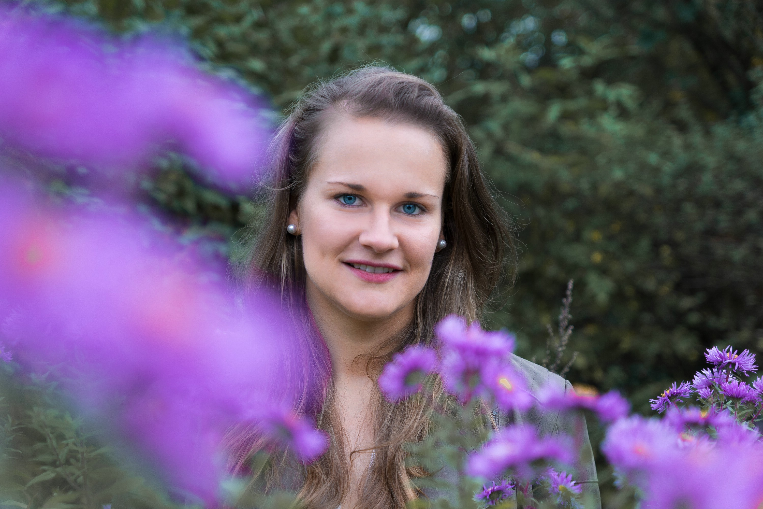 Bundesliga Fussballerin Friederike Abt von der TSG 1899 Hoffenheim bei einer Fotosession mit ihrem Freund und Lebensgefaehrten Vincent Rapohl an der Heerser Muehle in Bad Salzuflen im Dezember 2017.